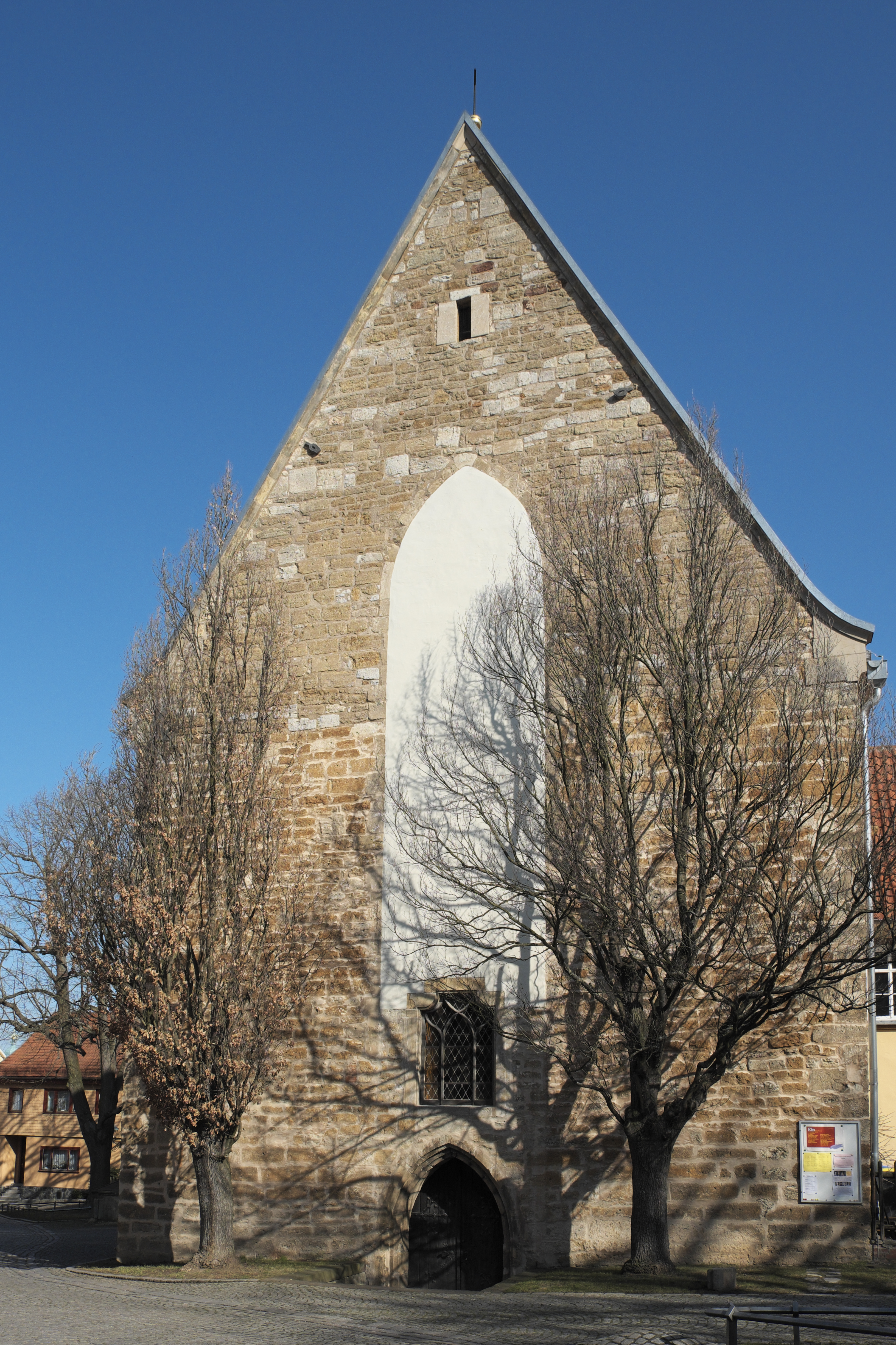 Oberkirche, ehemalige Franziskanerkirche, in Arnstadt (Thüringen/Deutschland)